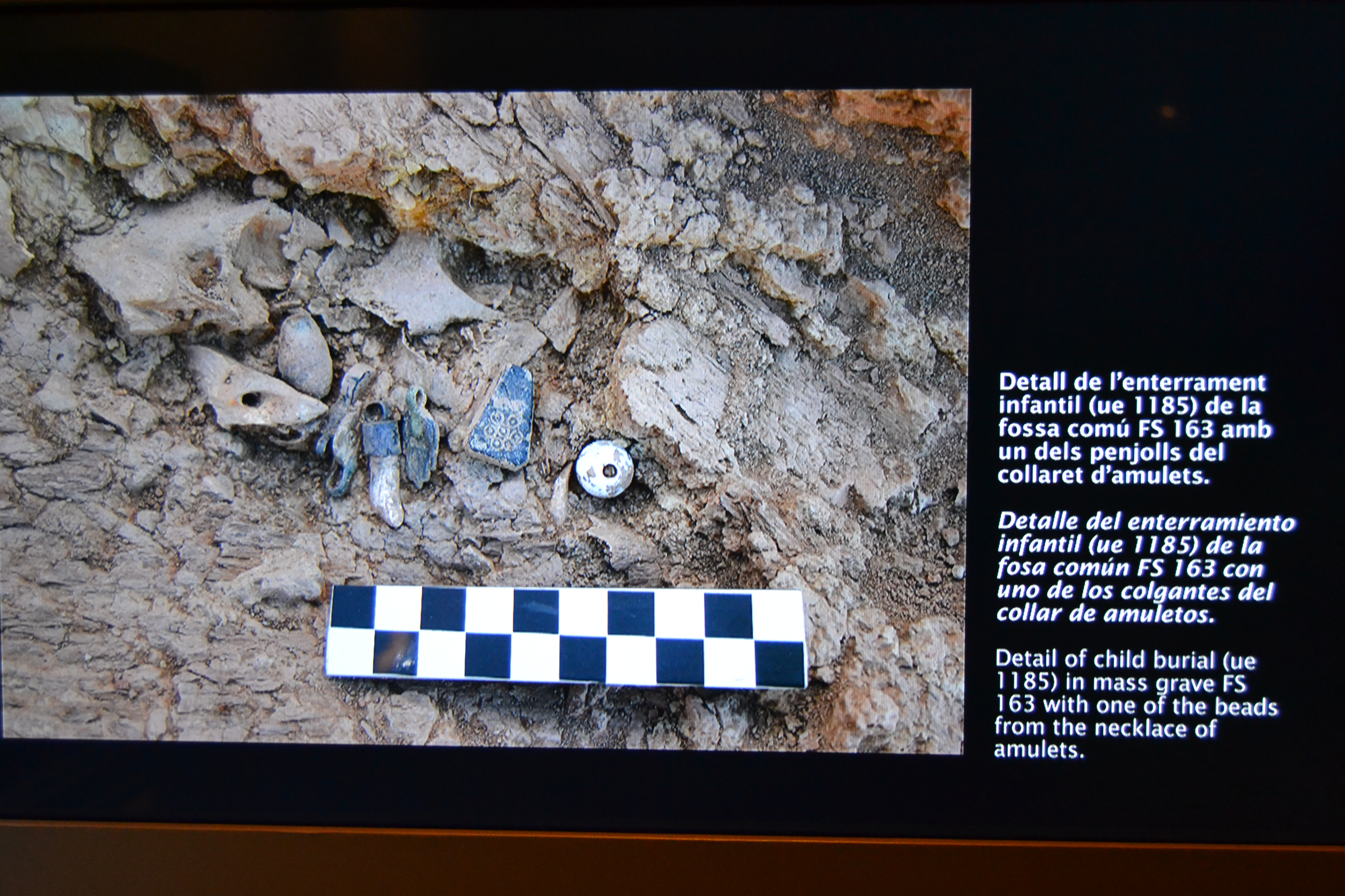 Audiovisual del Museu Comarcal de l'Urgell